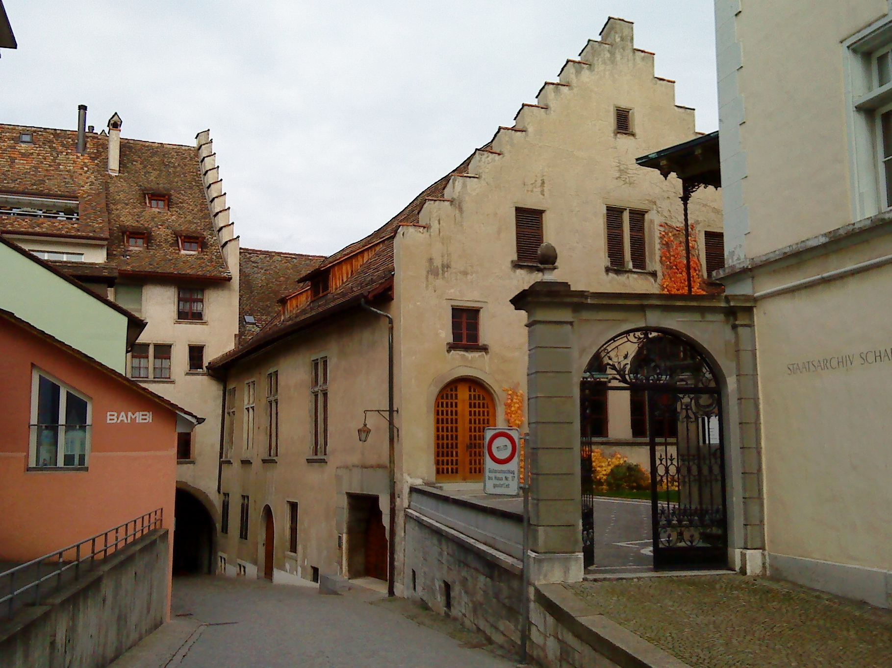 Rathaus (Rathauslaube) in Schaffhausen/Schweiz.